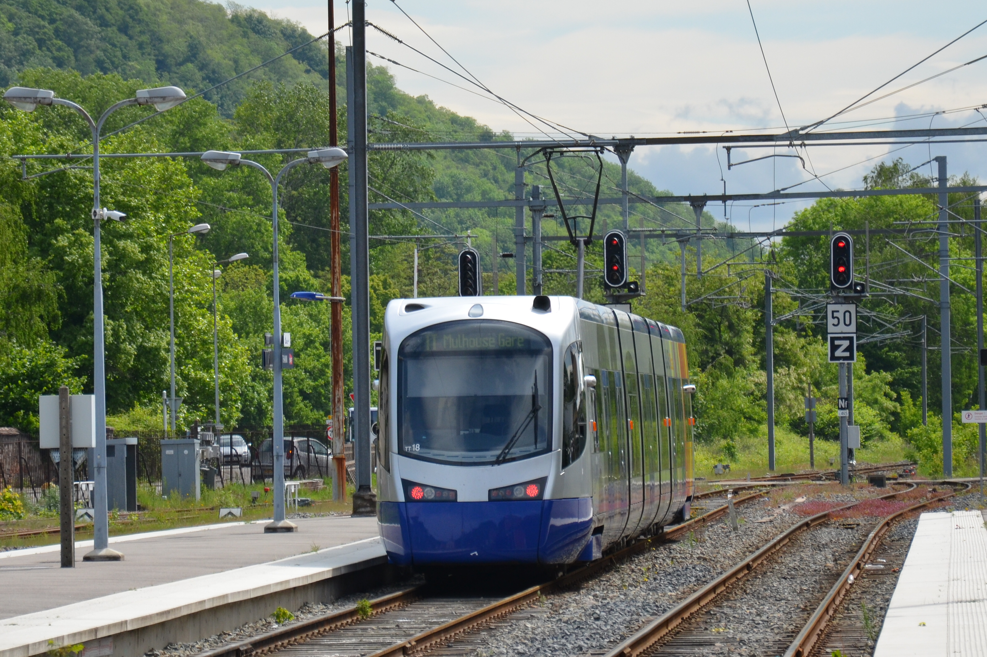 Siemens Avanto SNCF U25500 TT18, à la gare de Thann, en attente d'ouverture du signal en provenance de Mulhouse Gare Centrale.